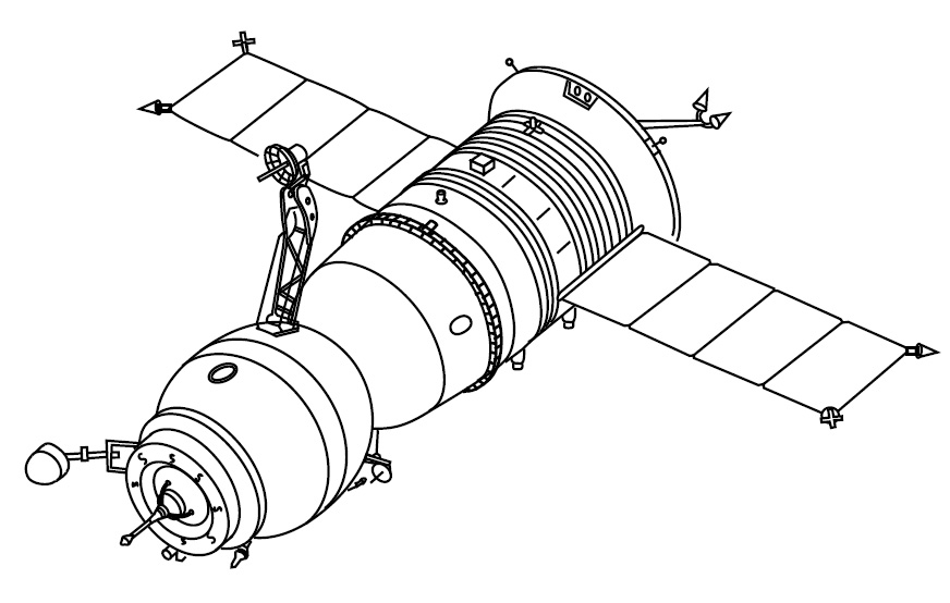 Figure 1-28. Soyuz-T spacecraft.